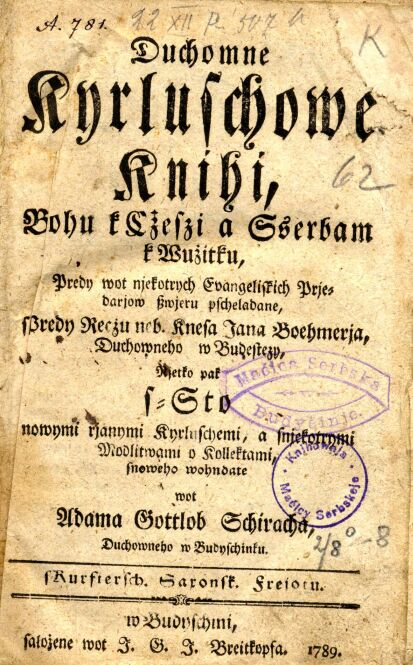 Titulna strona Duchomnych kěrlušowych knihow Hadama Bohuchwała Šěracha